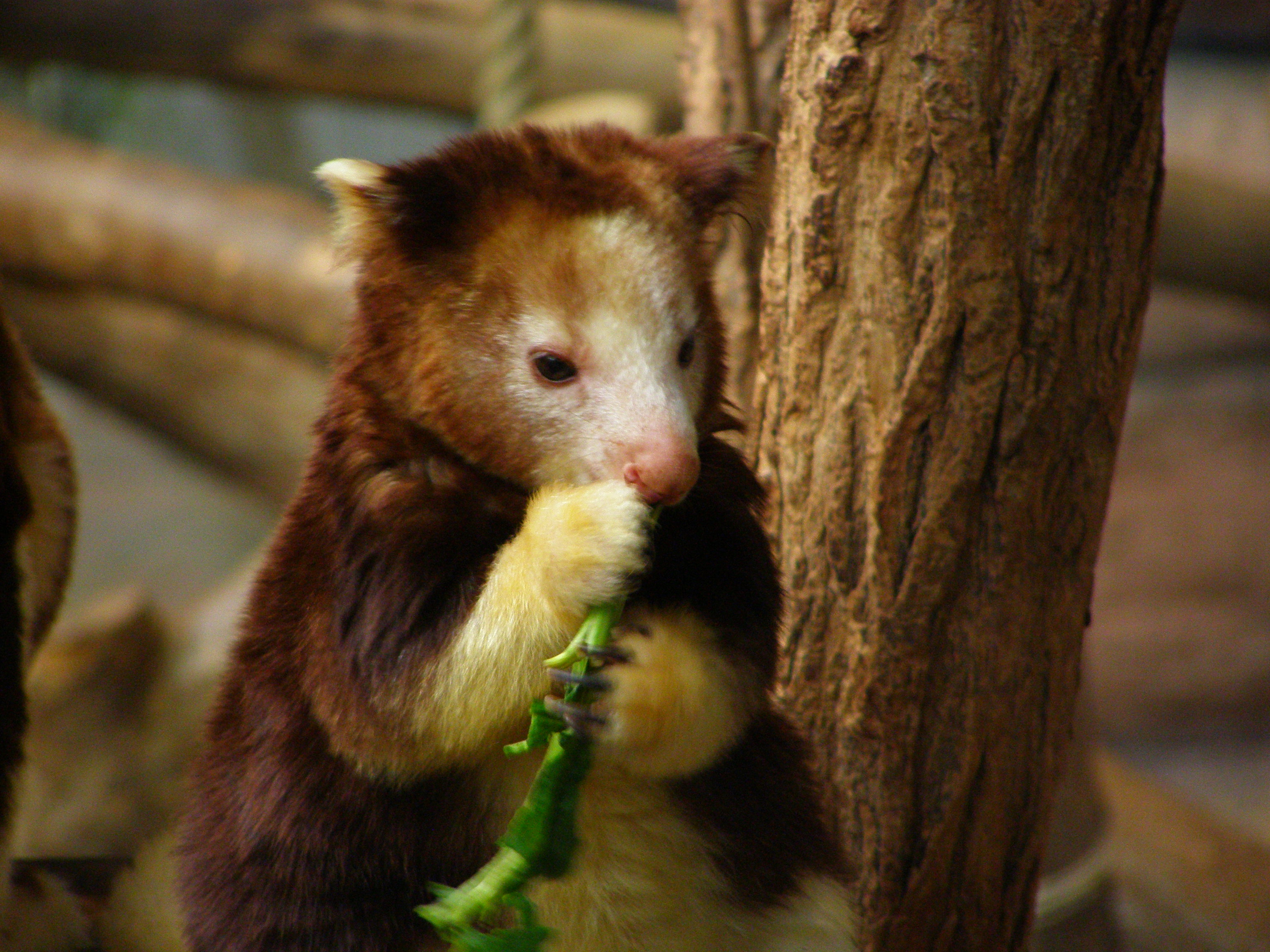 Dendrolagus matschiei, Matschie's Tree-Kangaroo eating in a zoo.